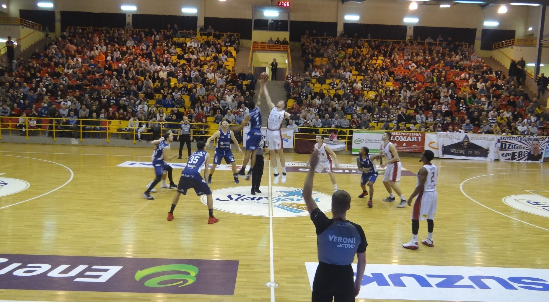 Spójnia Stargard - MKS Dąbrowa Górnicza (09.12.2018)